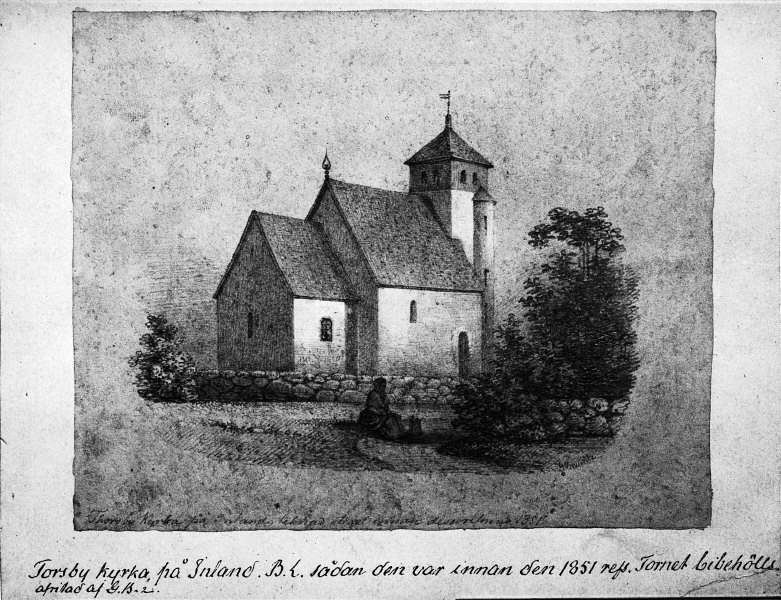 Teckning av gamla kyrkan. Kategori: (01) ExteriörerTeckning av gamla kyrkan.